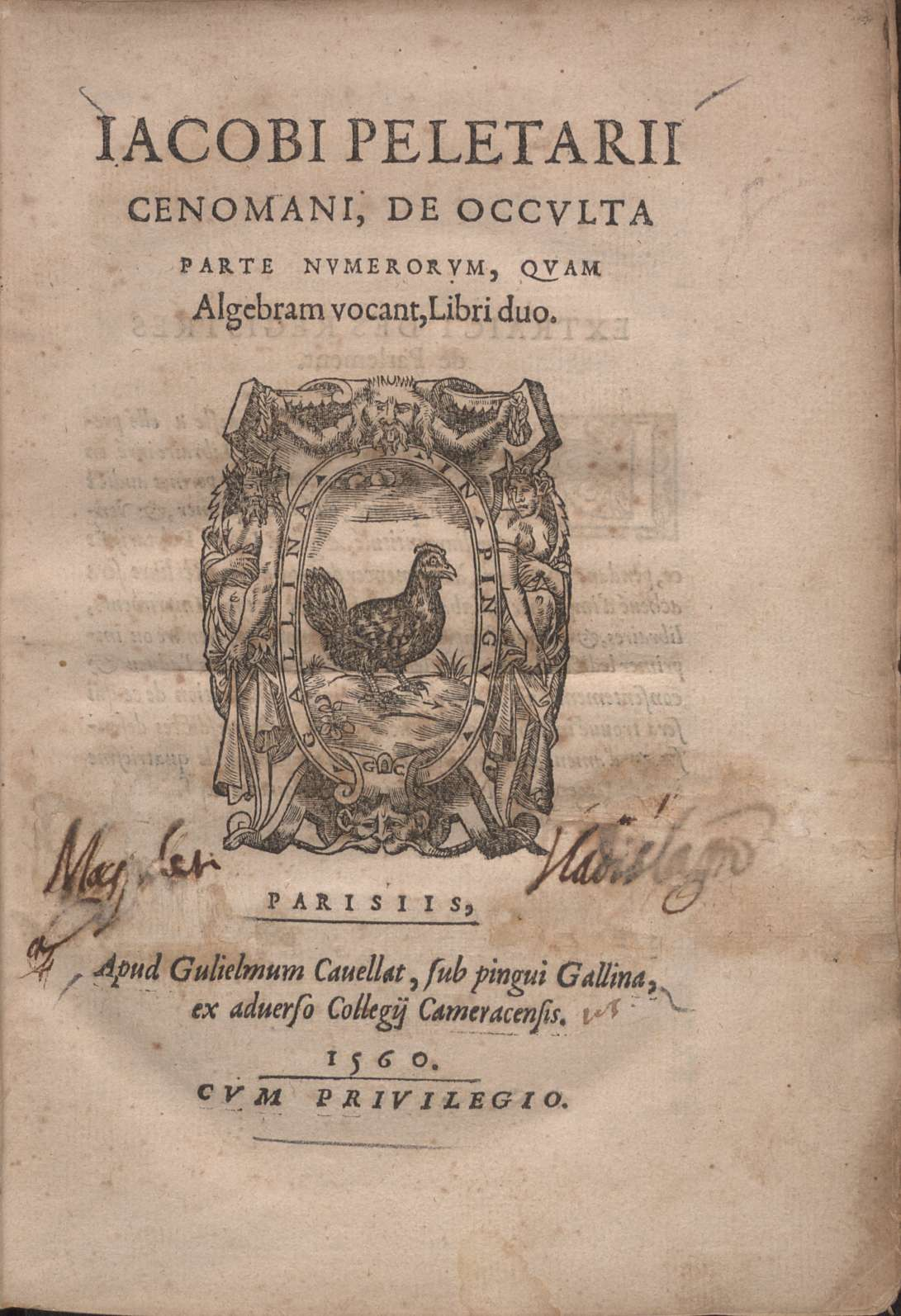 Frontespizio